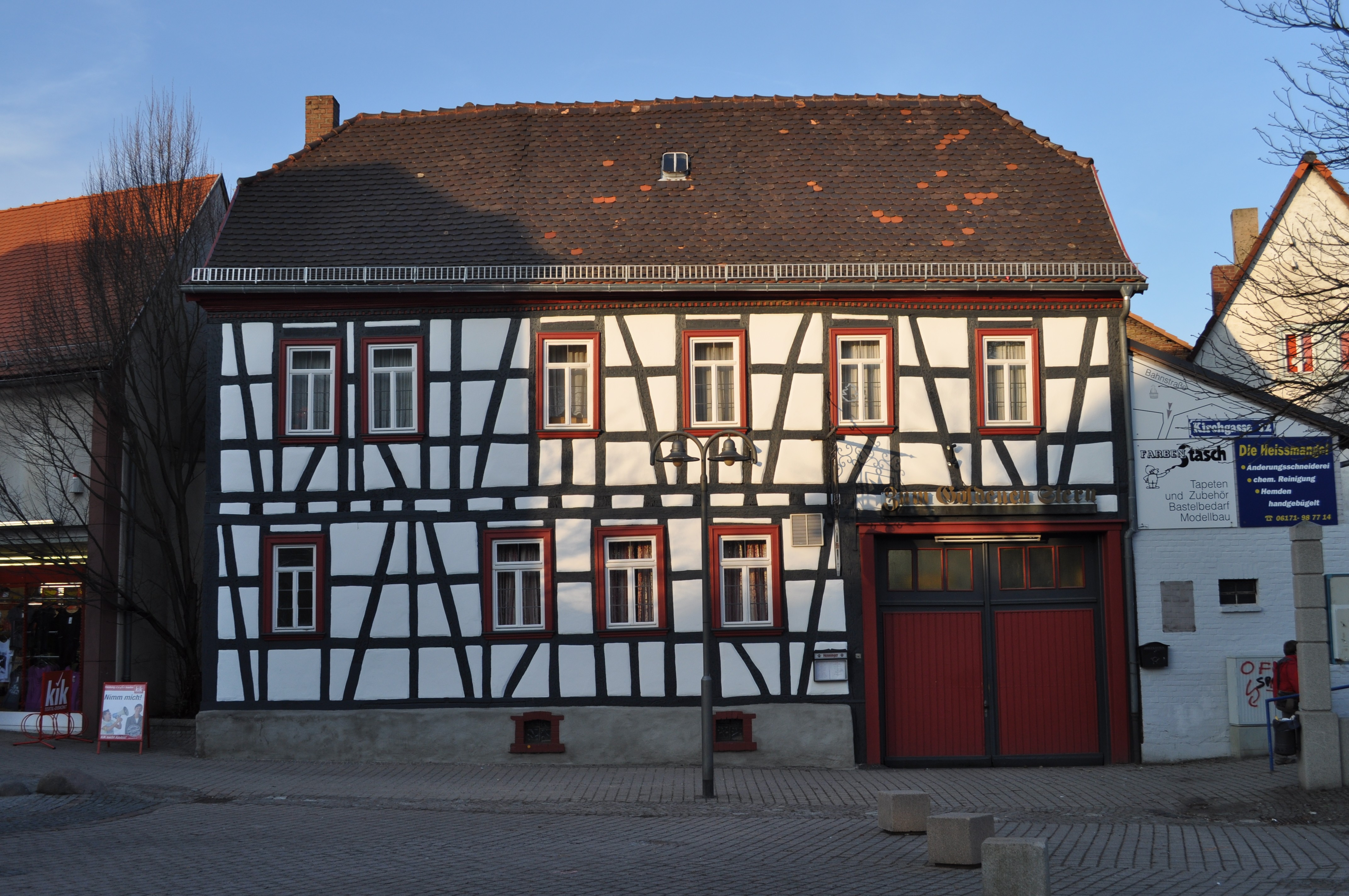 Gasthaus Zum Goldenen Stern in Steinbach (Taunus)